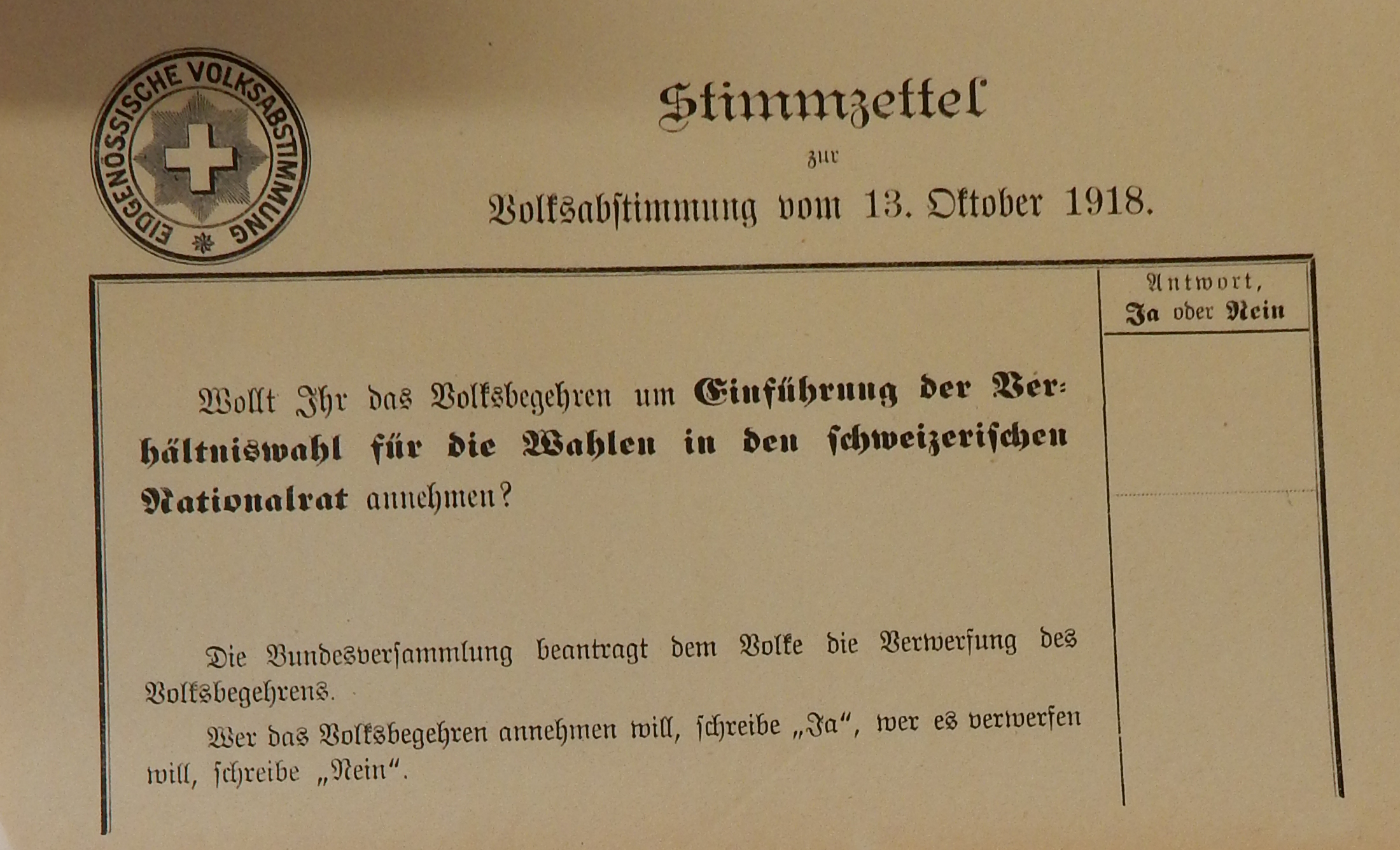 Schweiz: Stimmzettel zur Volksinitiative der Verhältniswahl (Proporzwahl) des Nationalrates